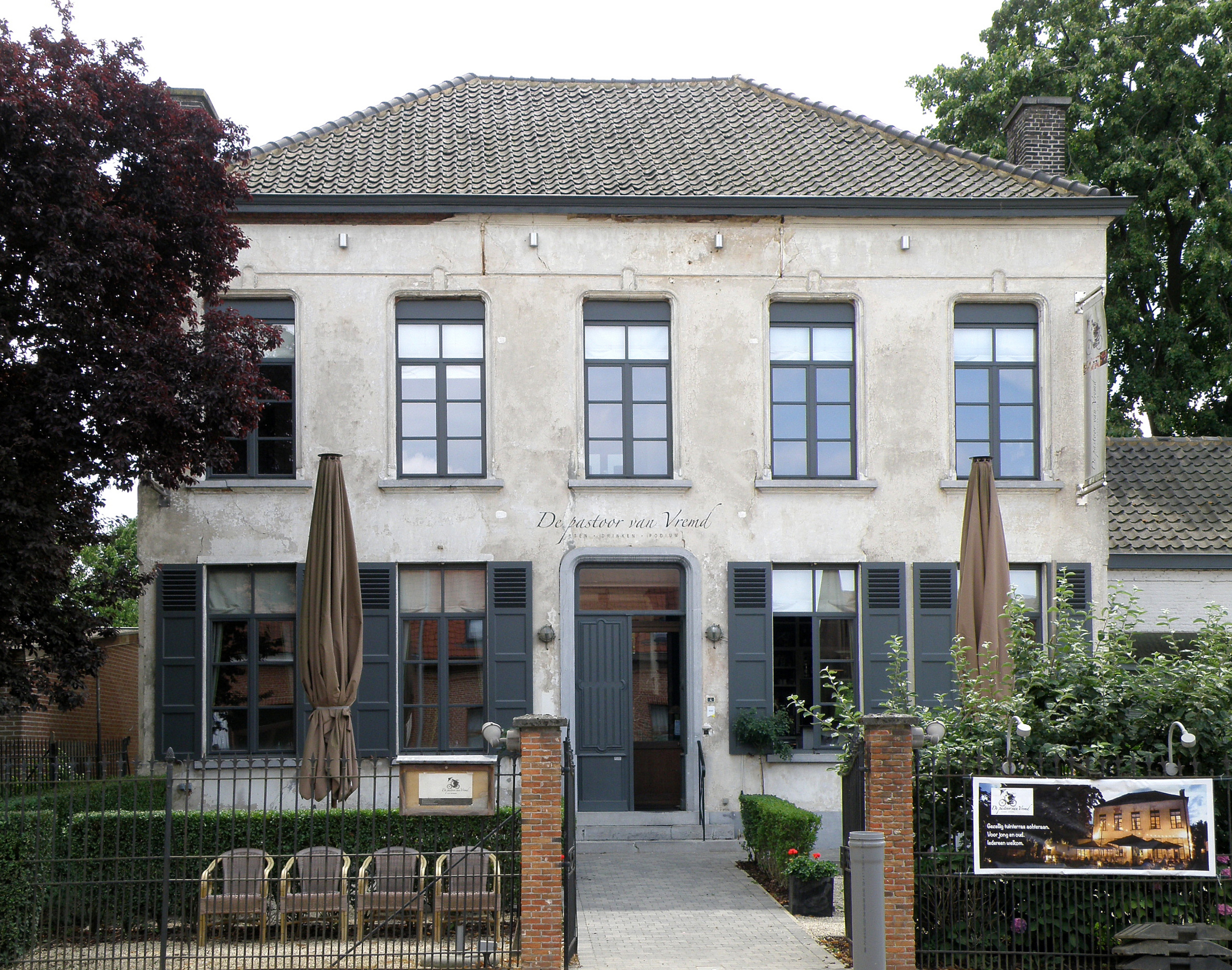 Vremde, gem. Boechout (prov. Antwerpen, België). Pastorie, Boomkensstraat nr.4 (nabij kerk). Thans restaurant. Archit. Henry Redig, anno 1852.